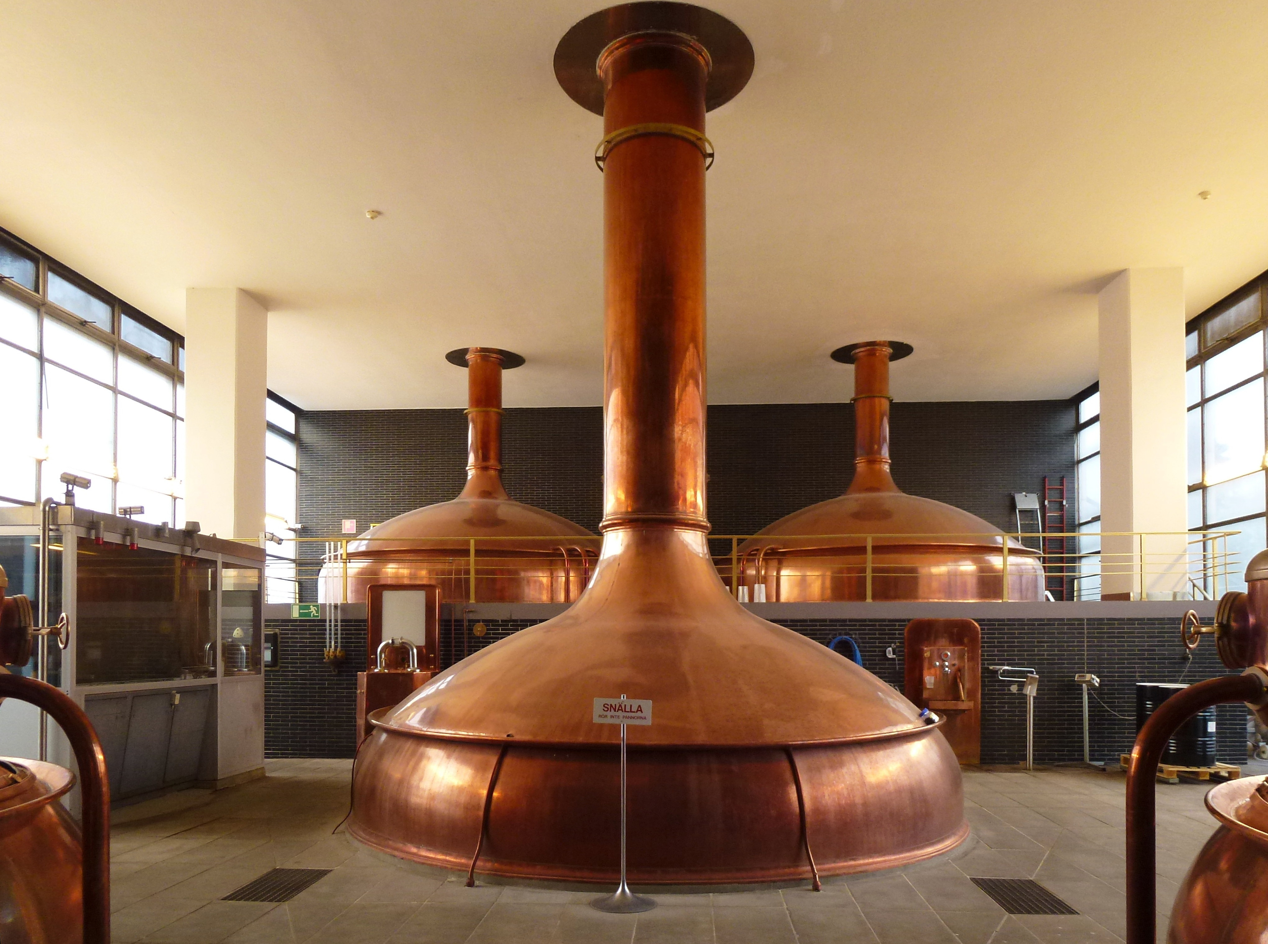 Brygghuset, Vårby bryggeri vörtpanna